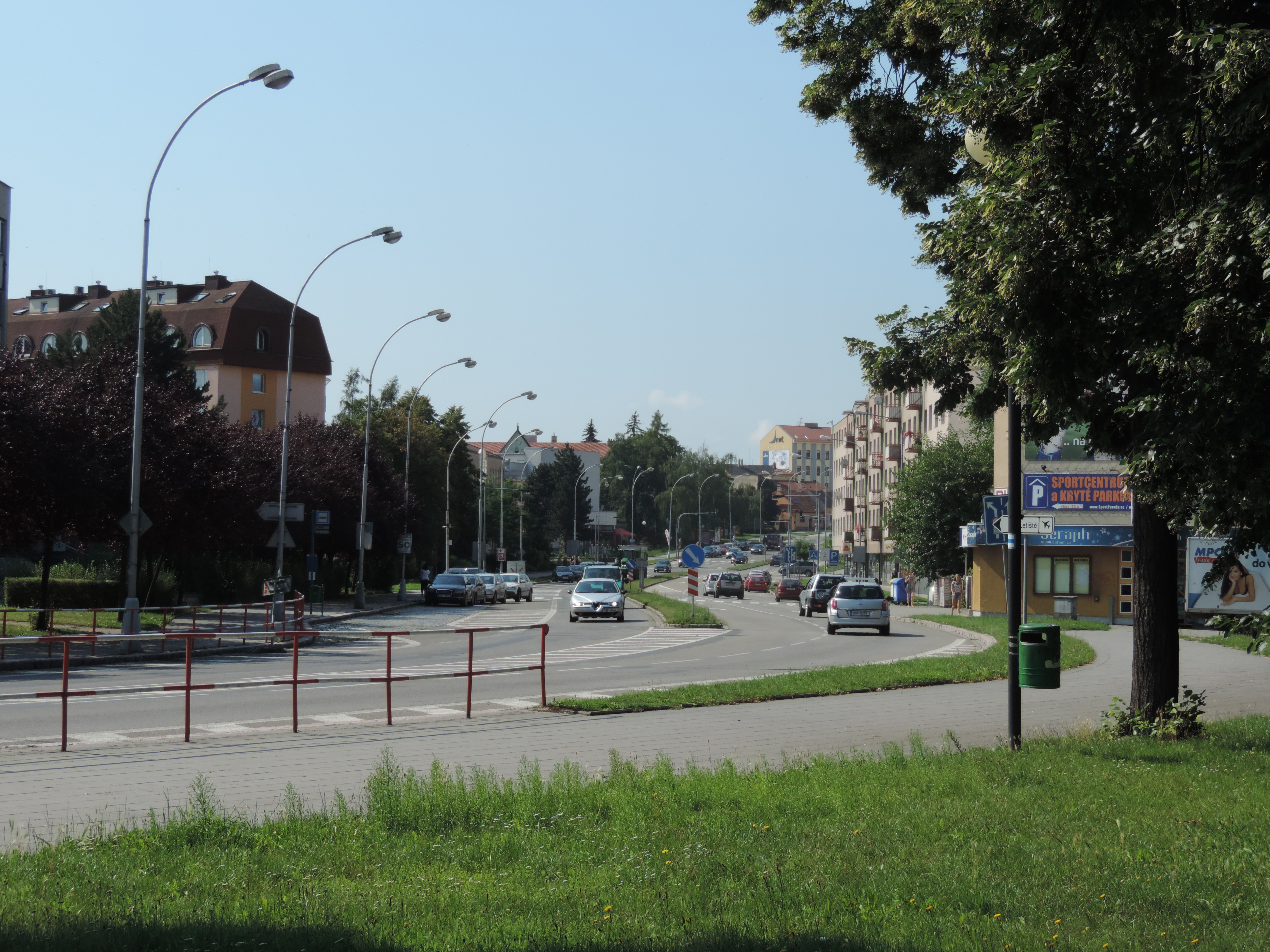 Kroměříž